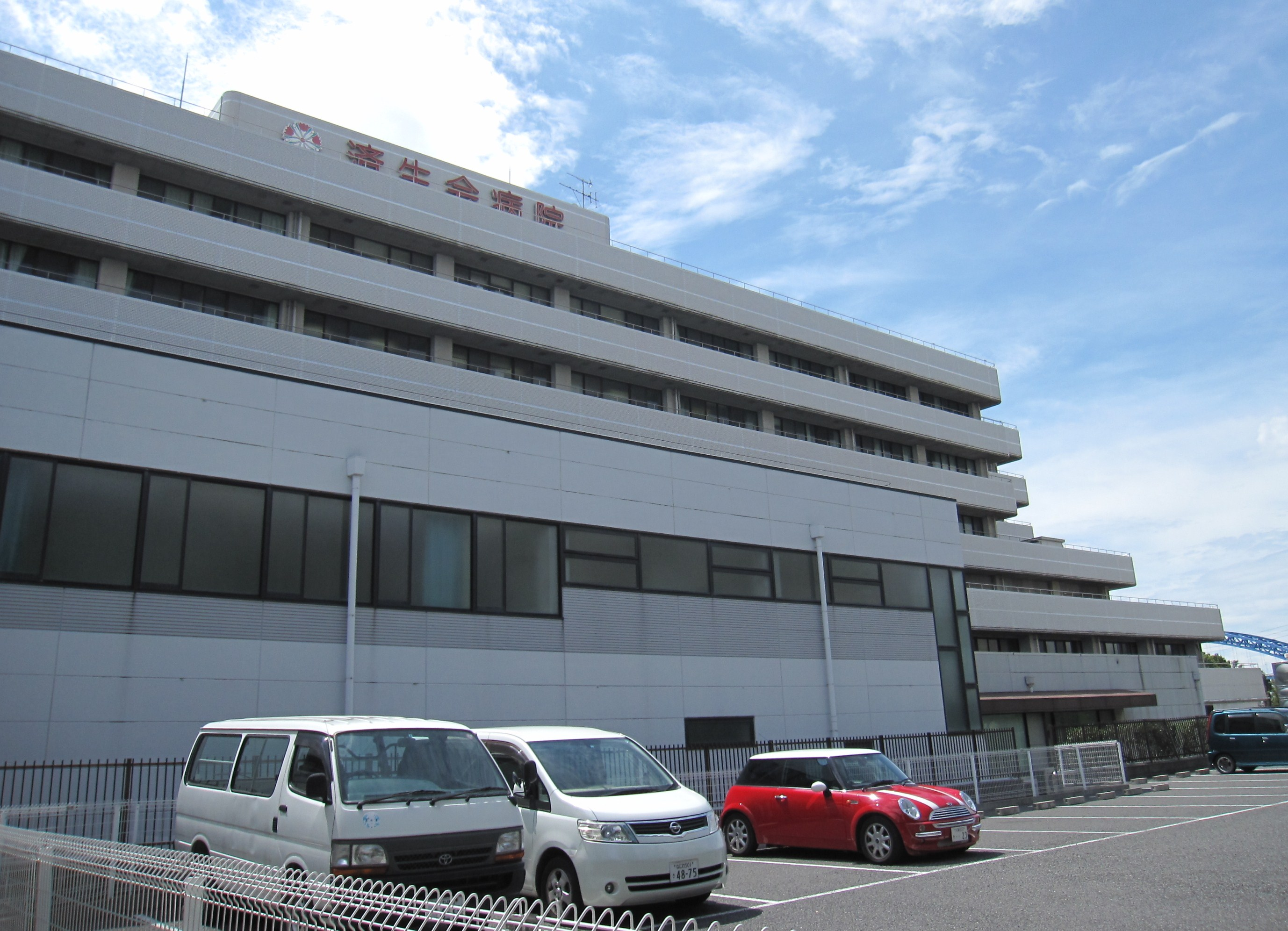 大阪府済生会泉尾病院